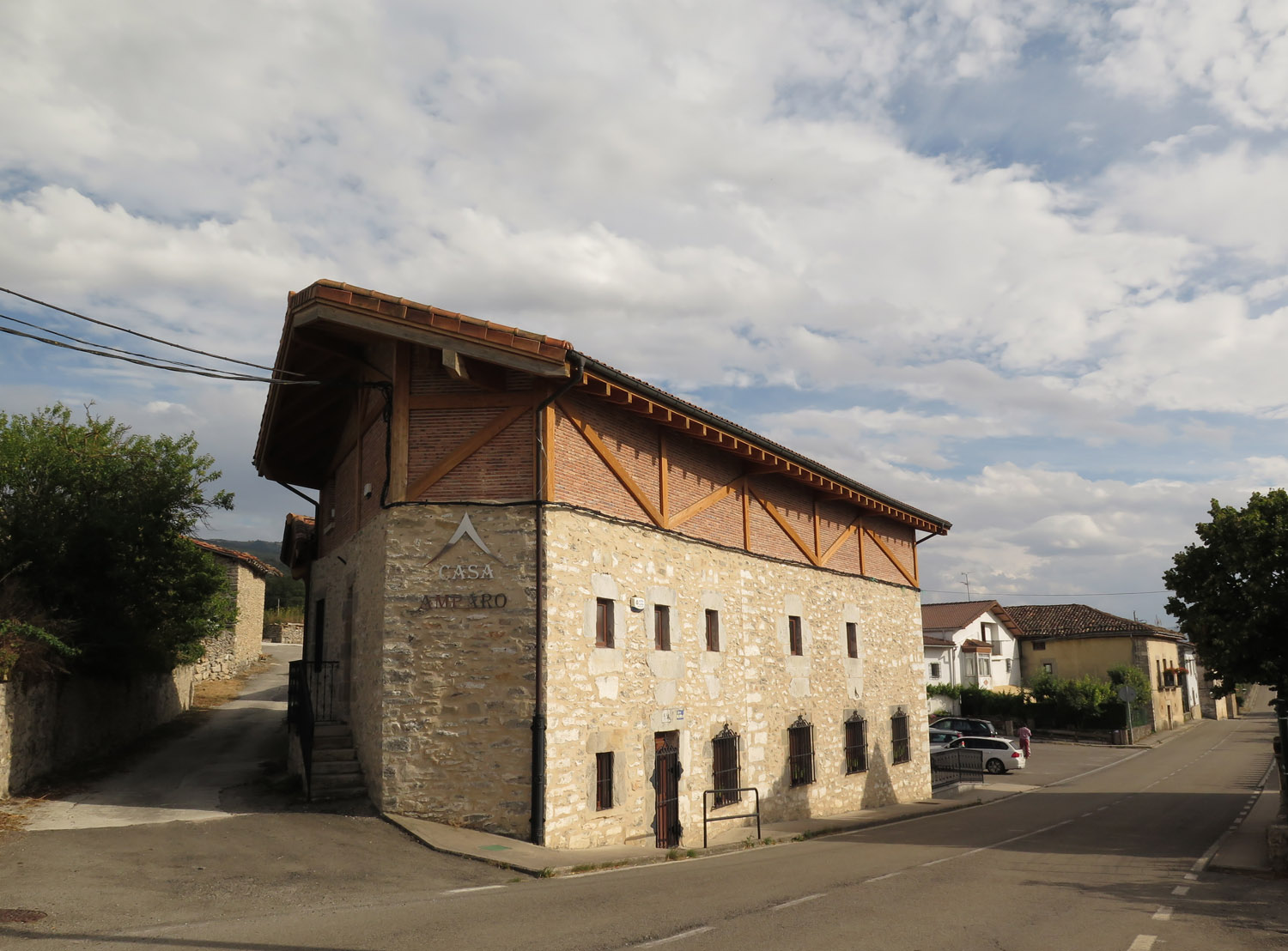 Restaurante junto a la carretera en el pueblo de Berberana (Las Merindades, provincia de Burgos).